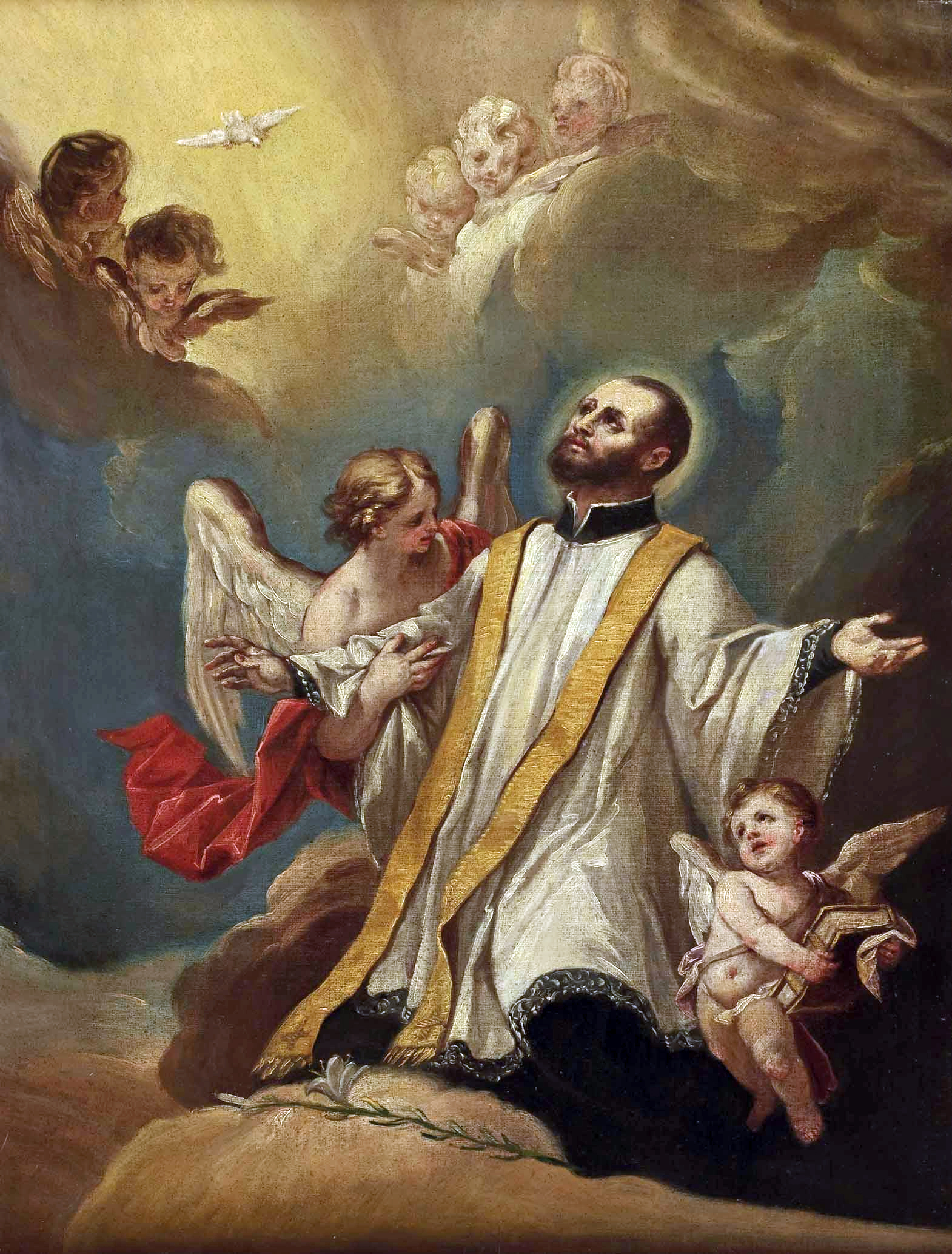 "Die Glorie des Hl. Kajetan von Thiene", Österreichische Schule, 18. Jh., im Buch monogrammiert: M. I. S. 17..?, Öl auf Leinwand, ca. 74 x 57 cm